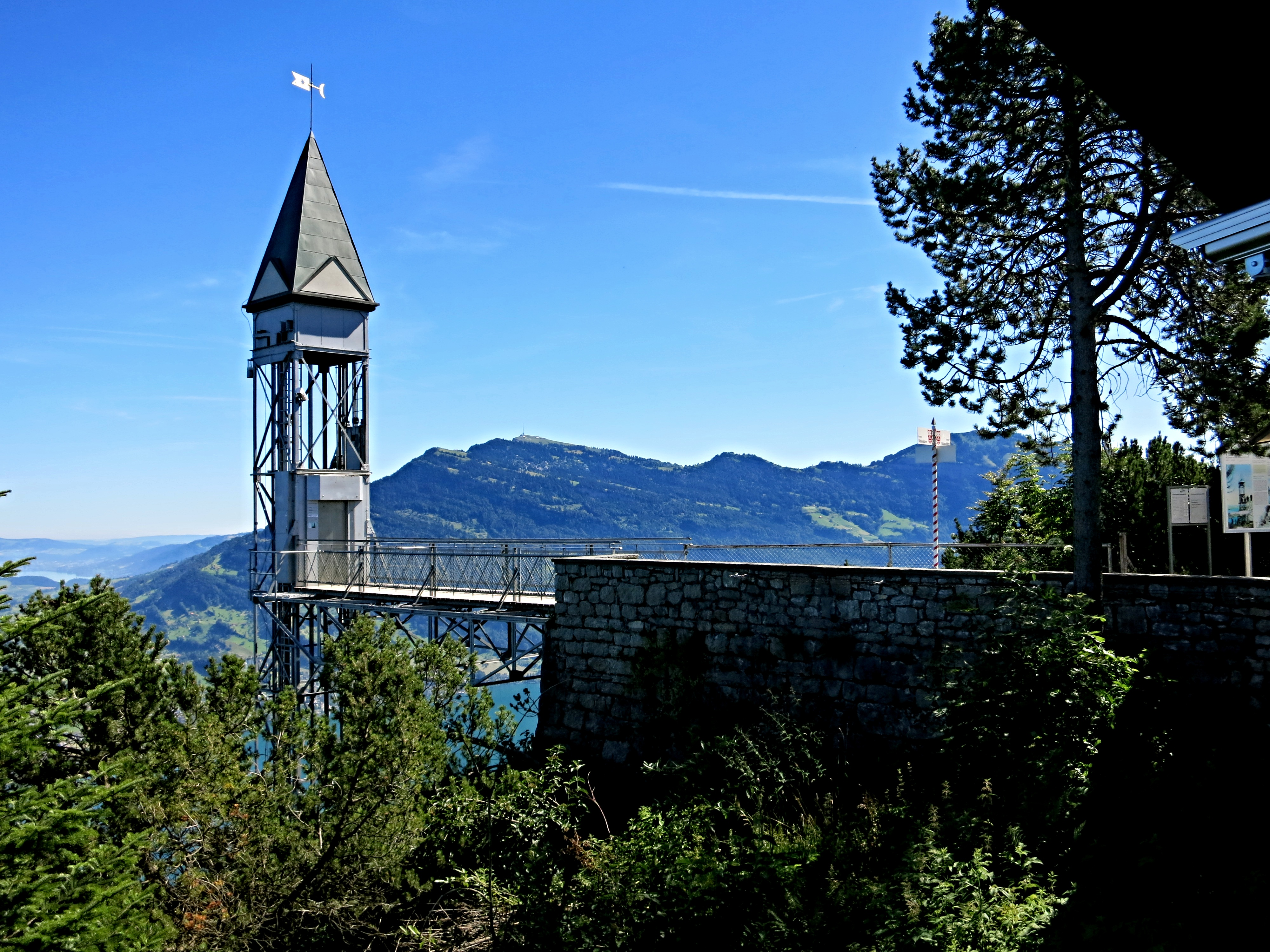 Oberer Teil des Hammetschwand-Liftes